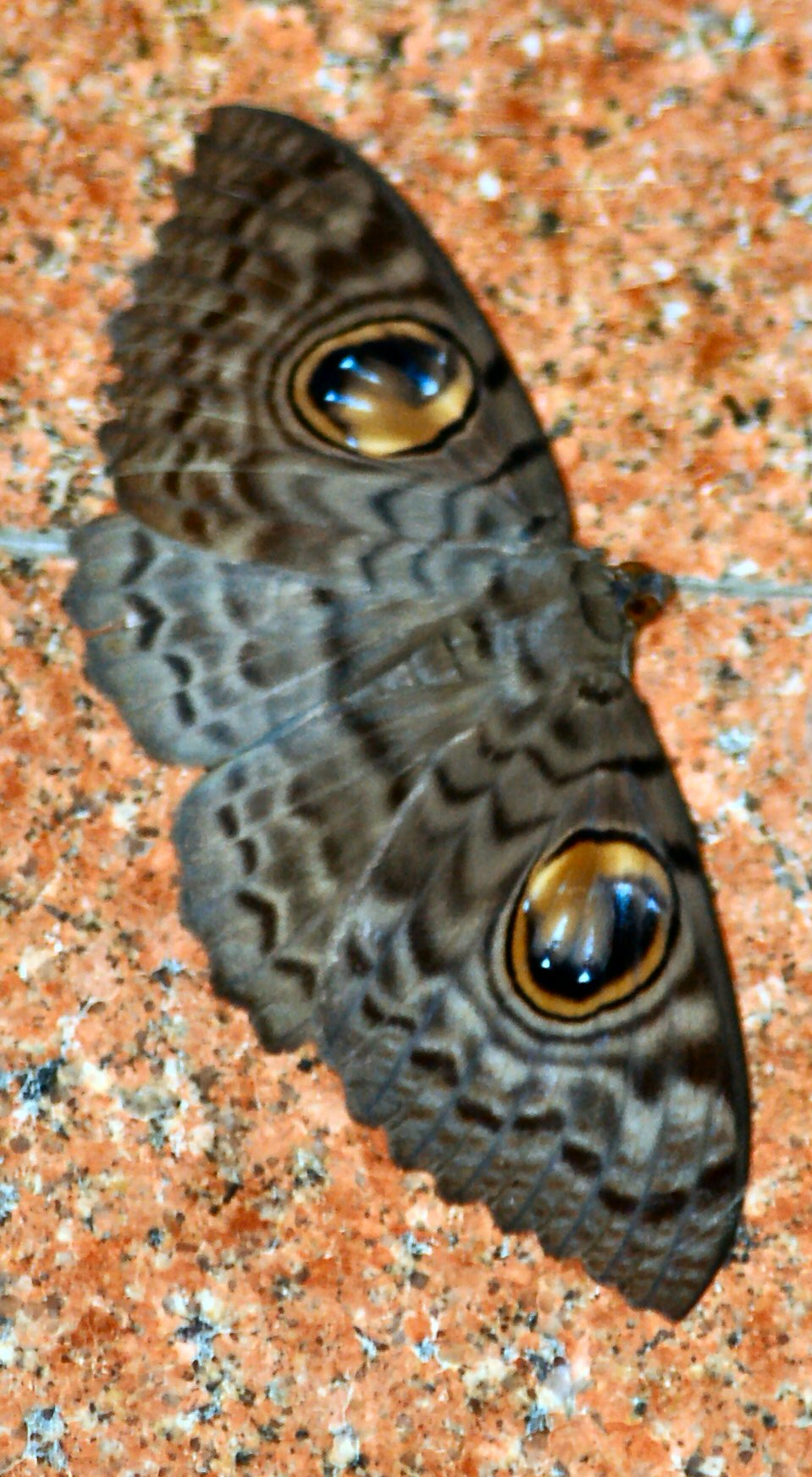 Erebus macrops [Noctuidae/Erebidae, Catocalinae]